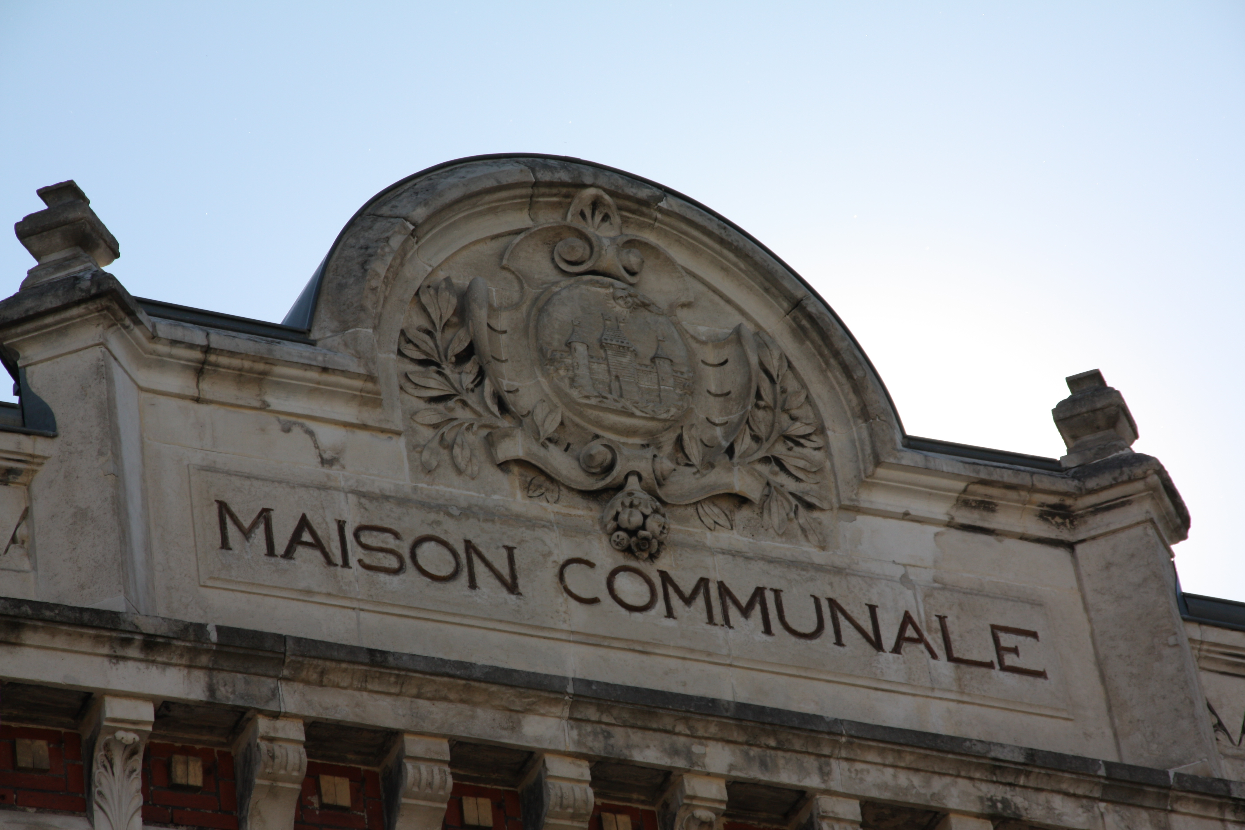 Bâtiments de Montluçon France